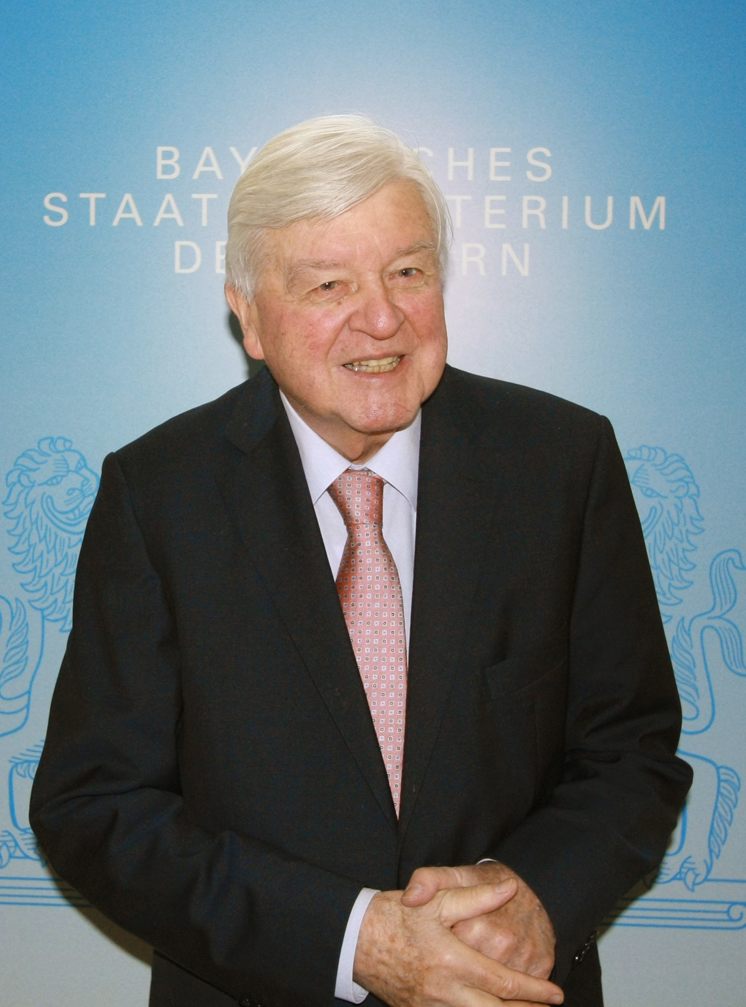 Hans Maier, deutscher Politikwissenschaftler und Politiker. Hier am 17.04.2012 im Bayerischen Innenministerium.